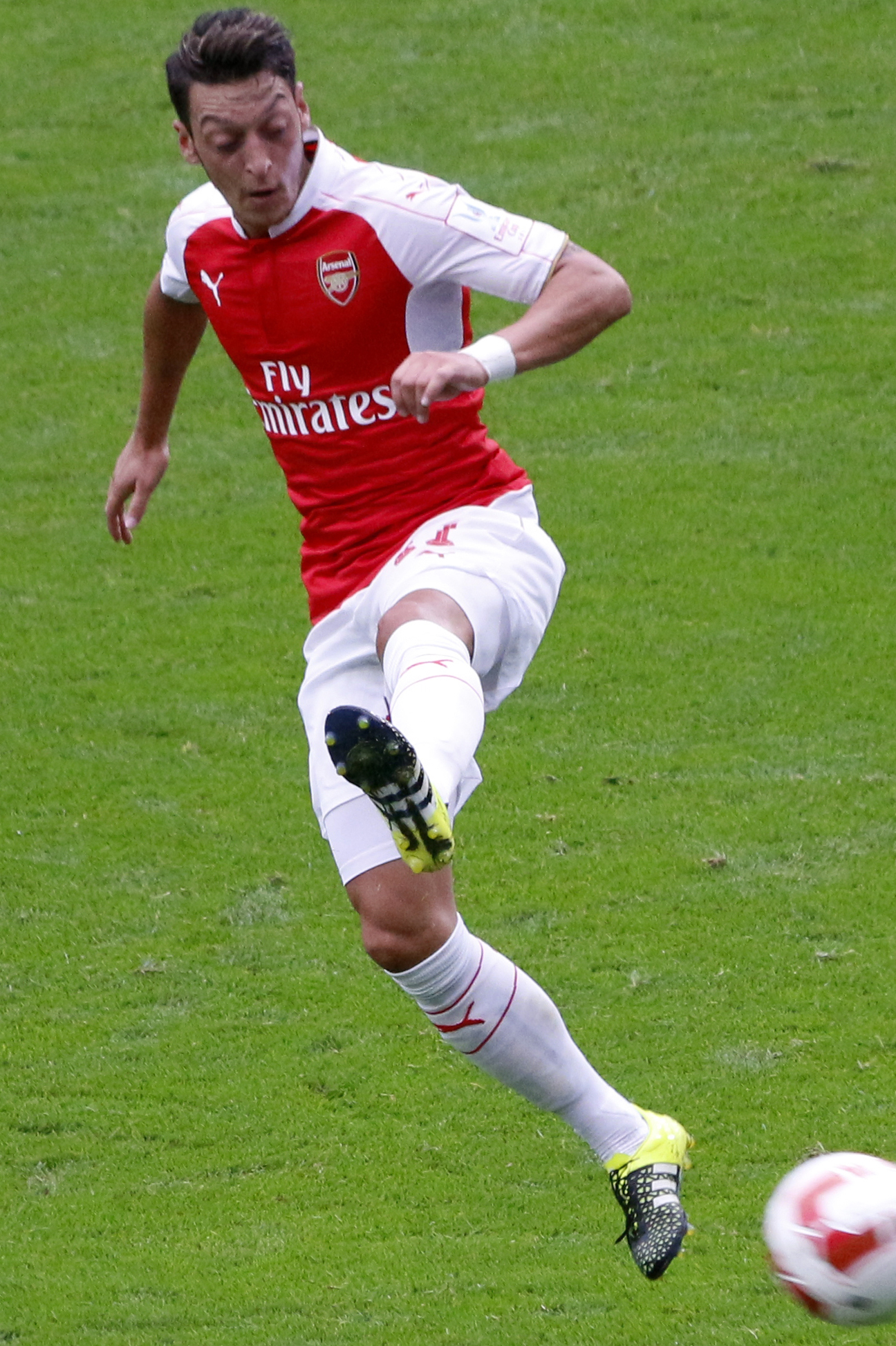 Emirates Cup 2015, Emirates Stadium